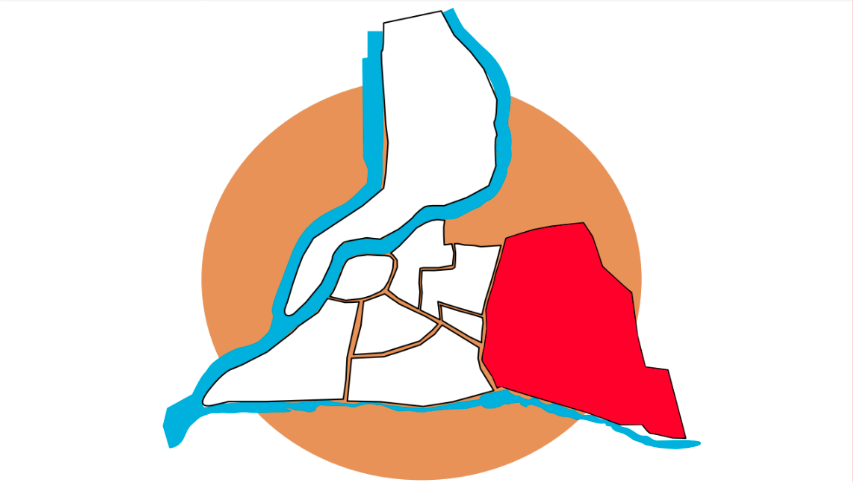 Emplacement du quartier de Montfavet sur la carte d'Avignon.